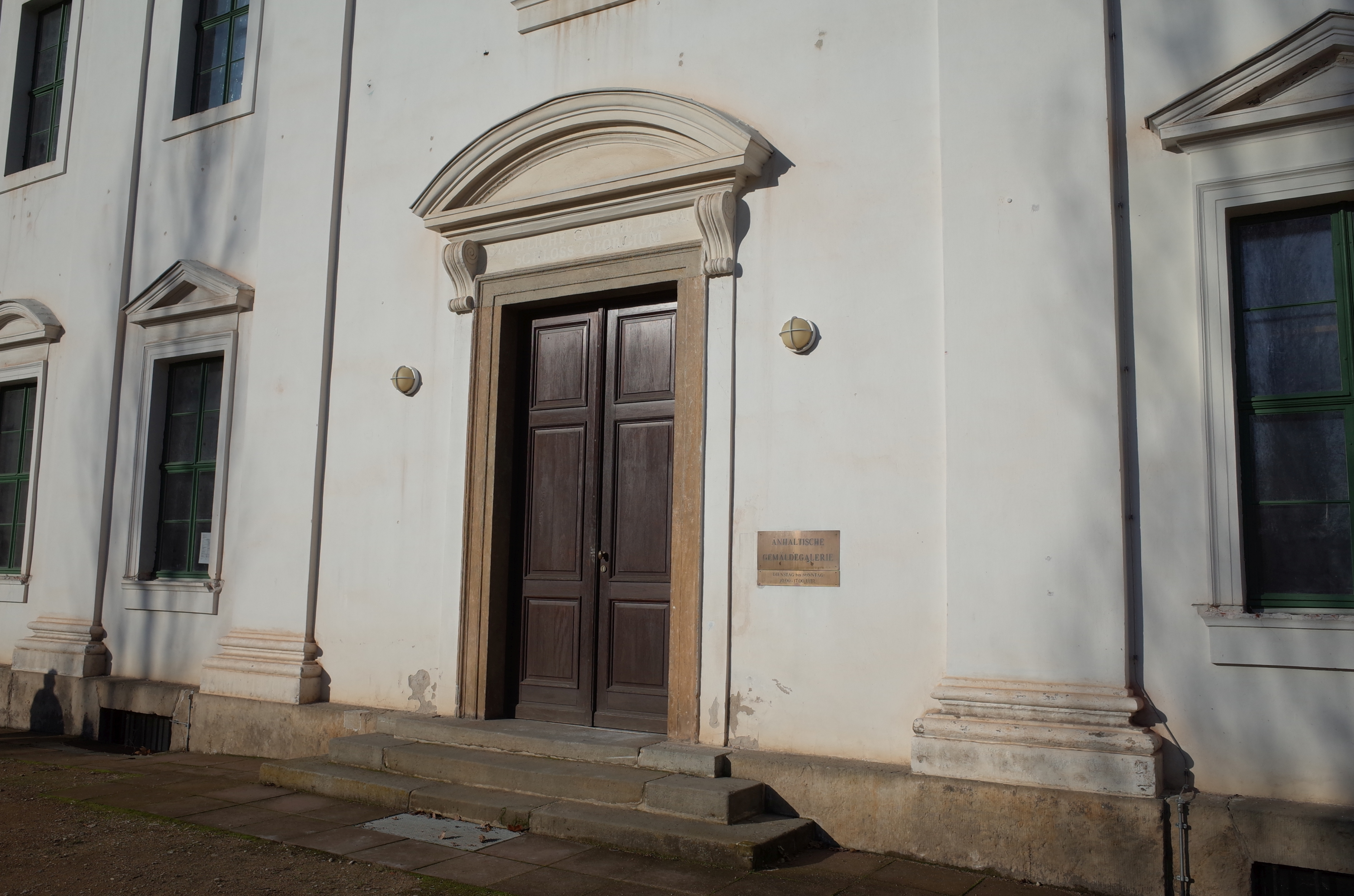 Dessau-Roßlau, Ortsteil Ziebigk. Eingang zur Anhaltischen Gemäldegalerie im Schloss Georgium.